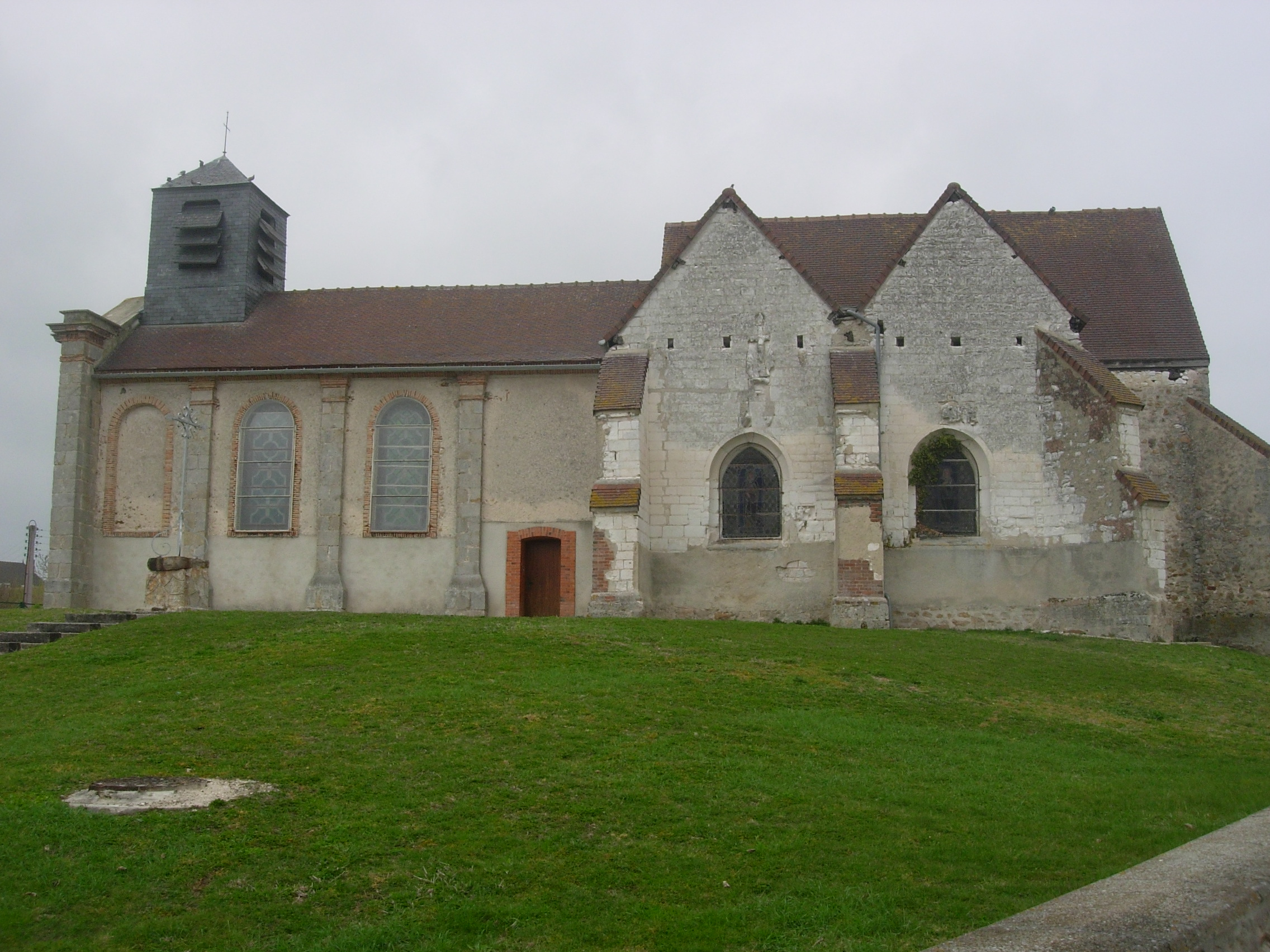 Eglise de Pars-lès-Romilly construite sur un ancien tumulus